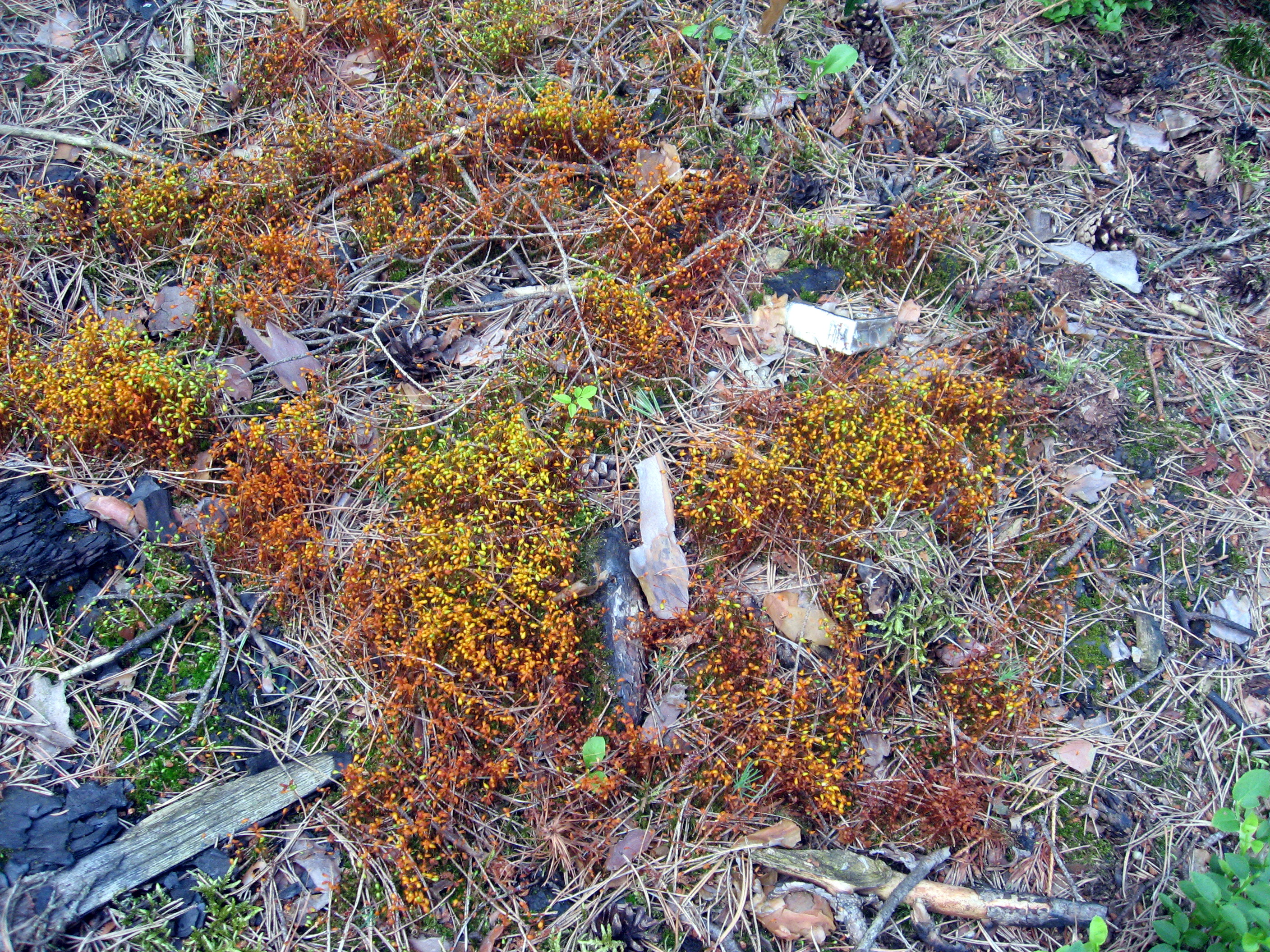 Mech poblíž Bělče nad Orlicí